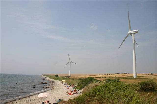 Windmills, Rise strand, Ærø